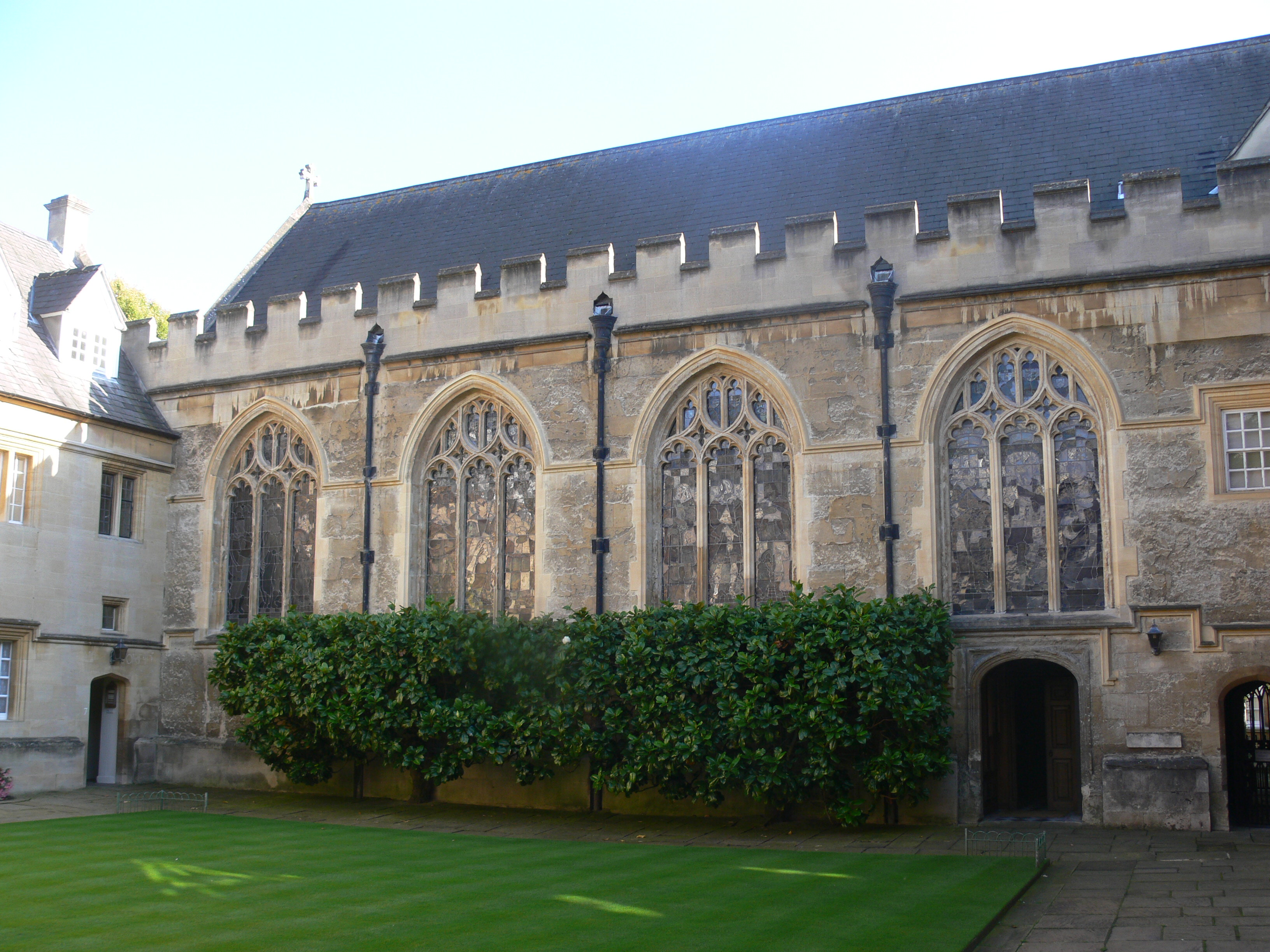 Oxford - Lincoln College - Chapel Quad